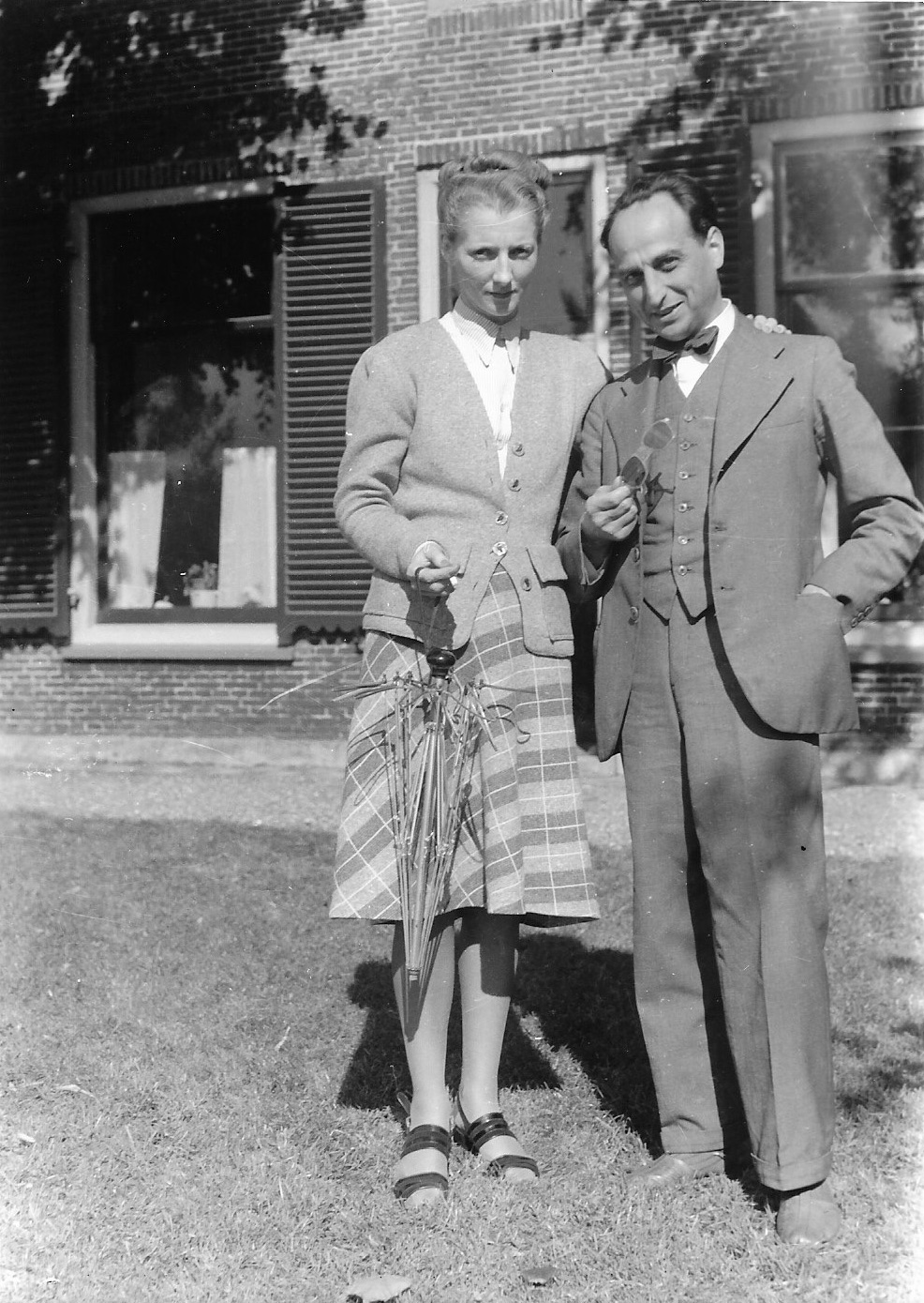 Kunsthandelaar Carel van Lier staat hier met Wilma Willink, de 2e vrouw van Carel Willink, de schilder die exposeerde bij van Lier.